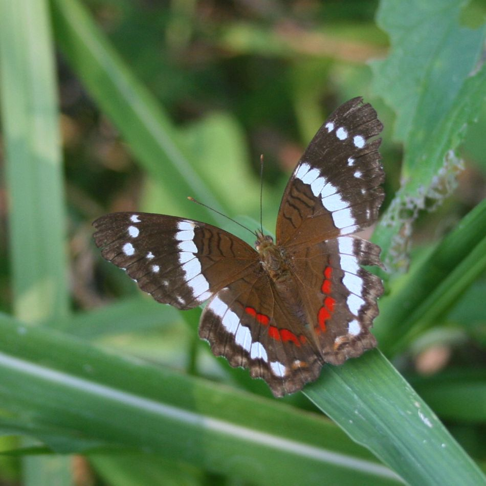 Anartia fatima, Edelfalter (Nymphalidae) - Costa Rica: Prov. Puntarenas, Hacienda Barú NW Dominical